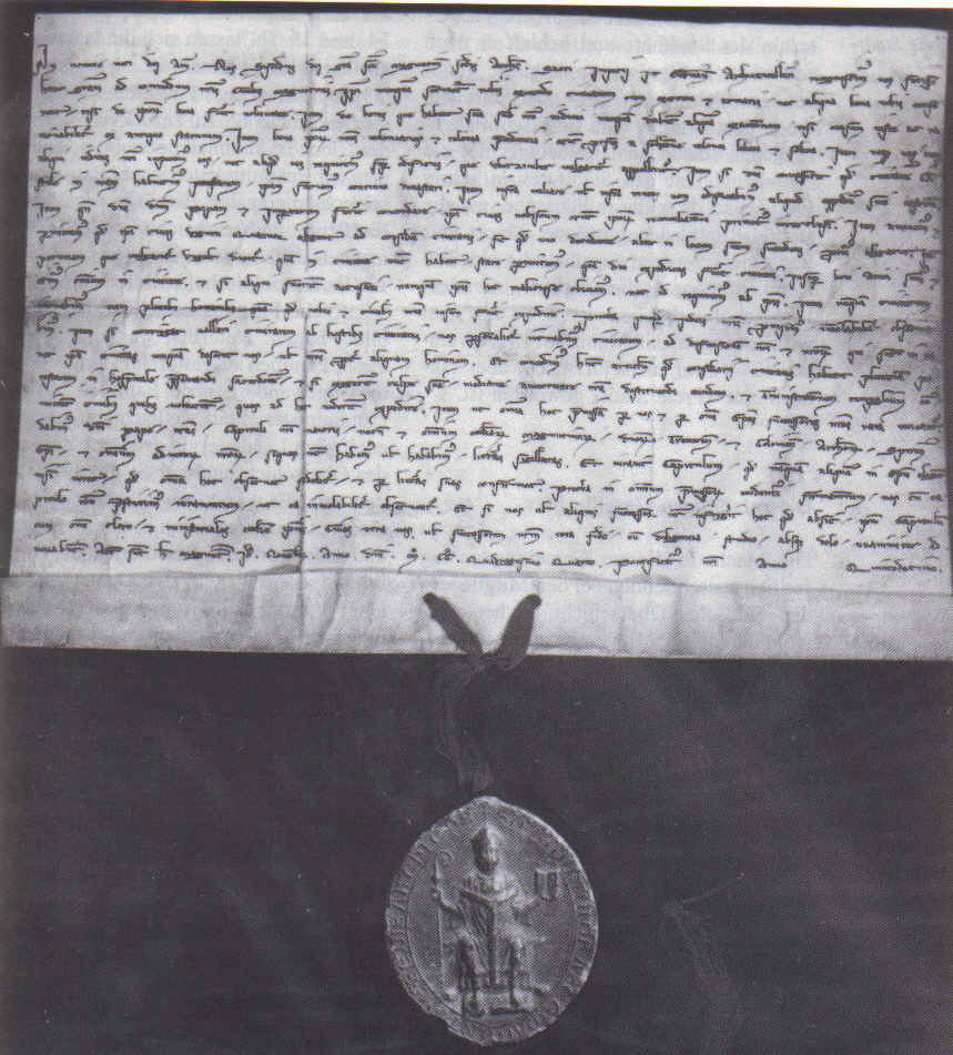 Beschreibung: Kastell Saalburg Quelle: selbst fotografiert Fotograf: Datum der Aufnahme: 15.10.2000